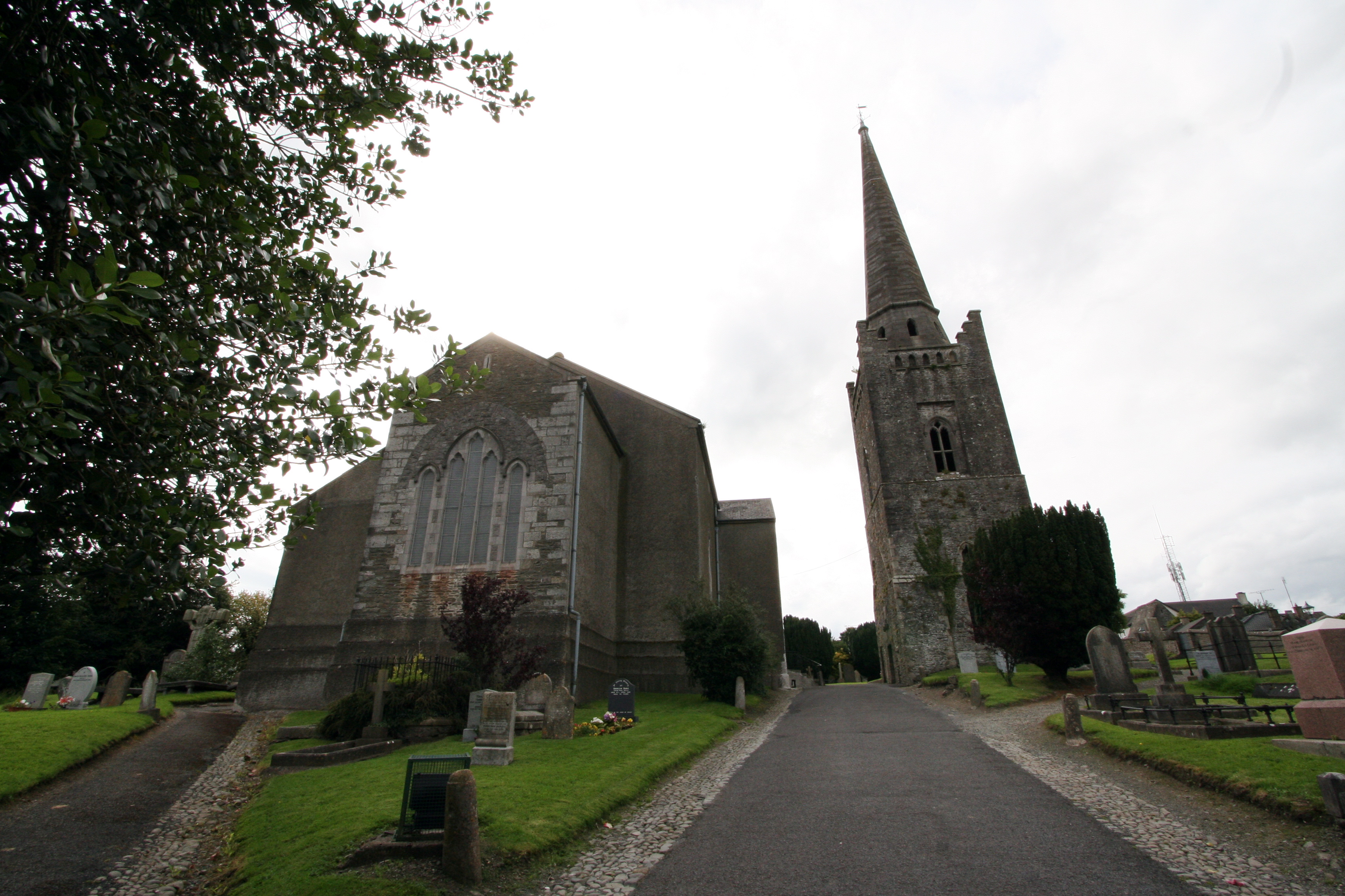 Kells Abbey, Kells, MeathMonasterio de Kells